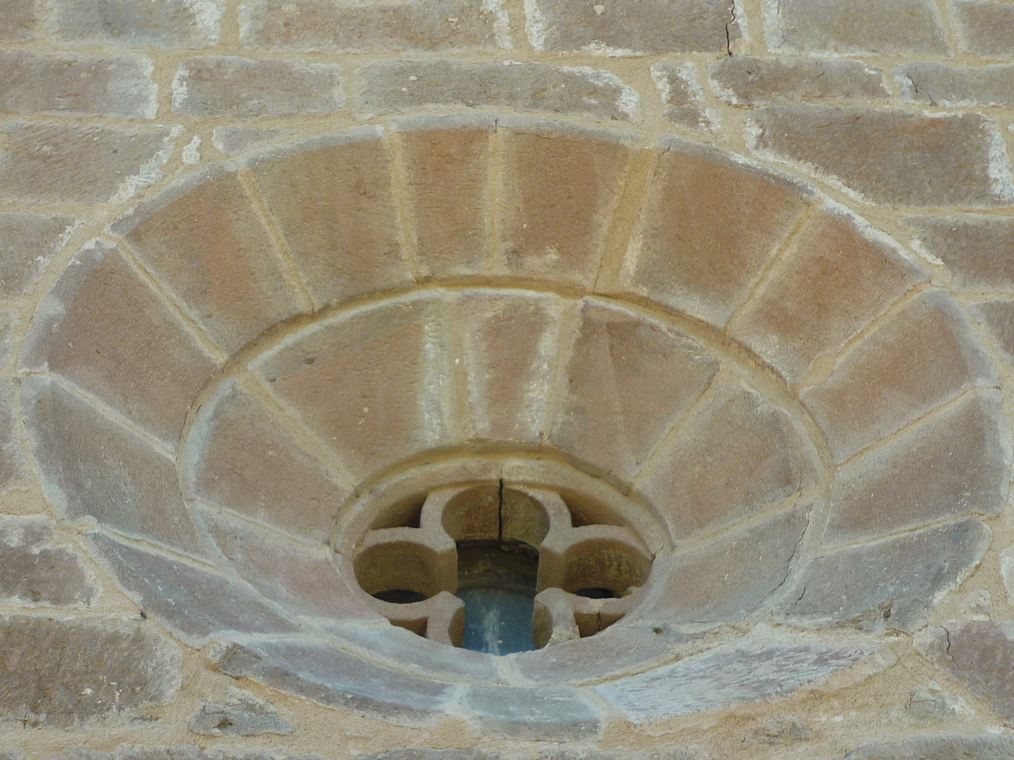 Antiga església de Sallent (Pinell de Solsonès): ócul de la façana